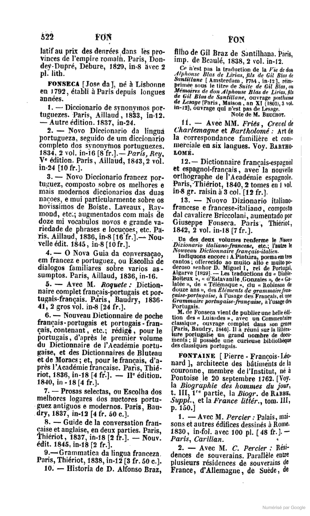 Page de La littérature française contemporaine. XIXe siècle: Le tout accompagné de notes biographiques et littéraires.